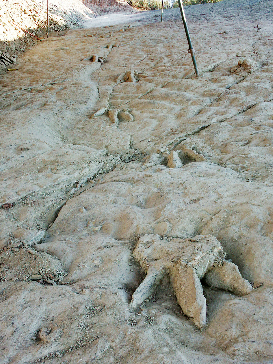 Rastro del terópodo "Atila", yacimiento de Costalomo, Salas de los Infantes (Burgos, España)